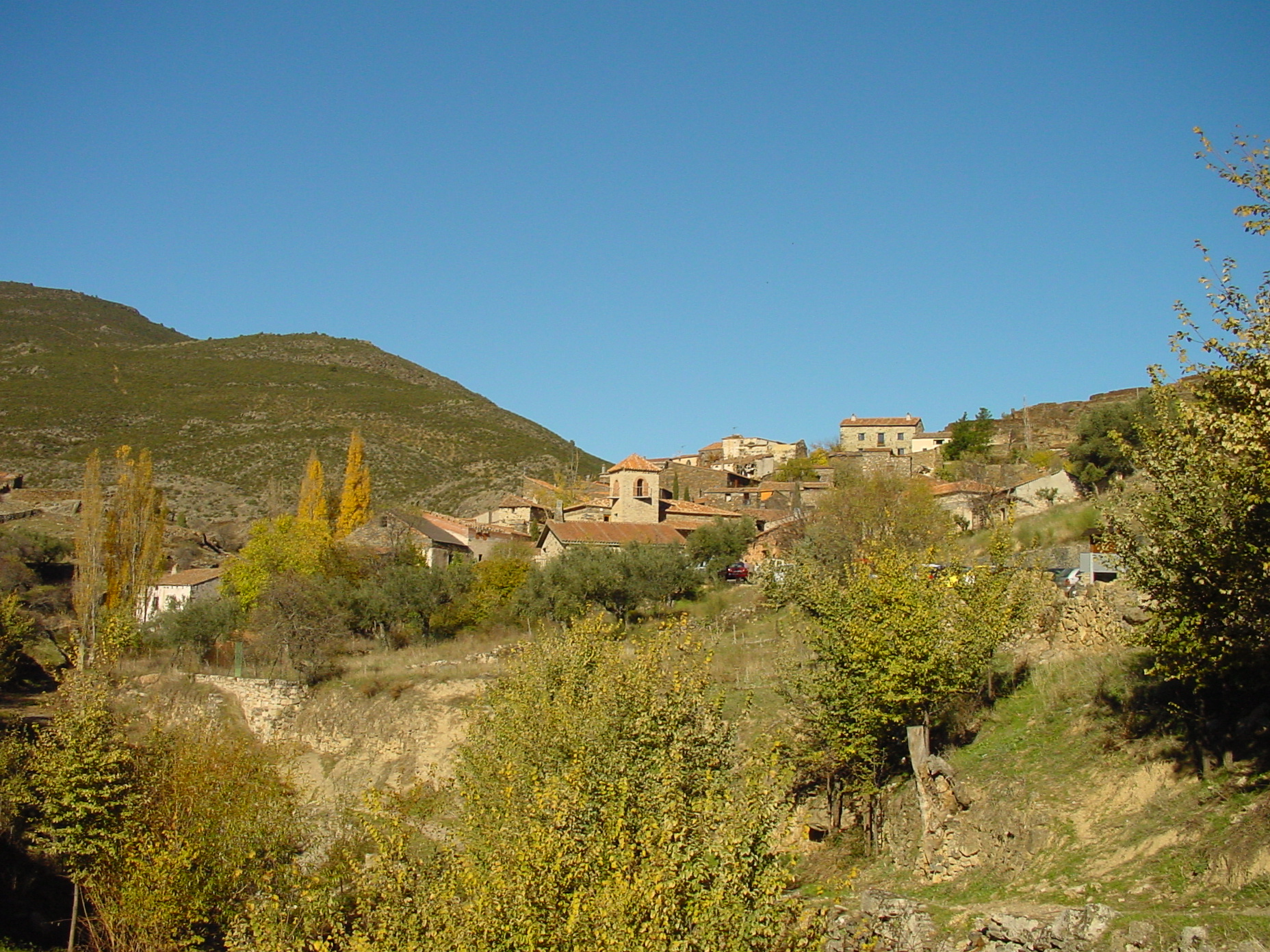 Vista general de Patones.